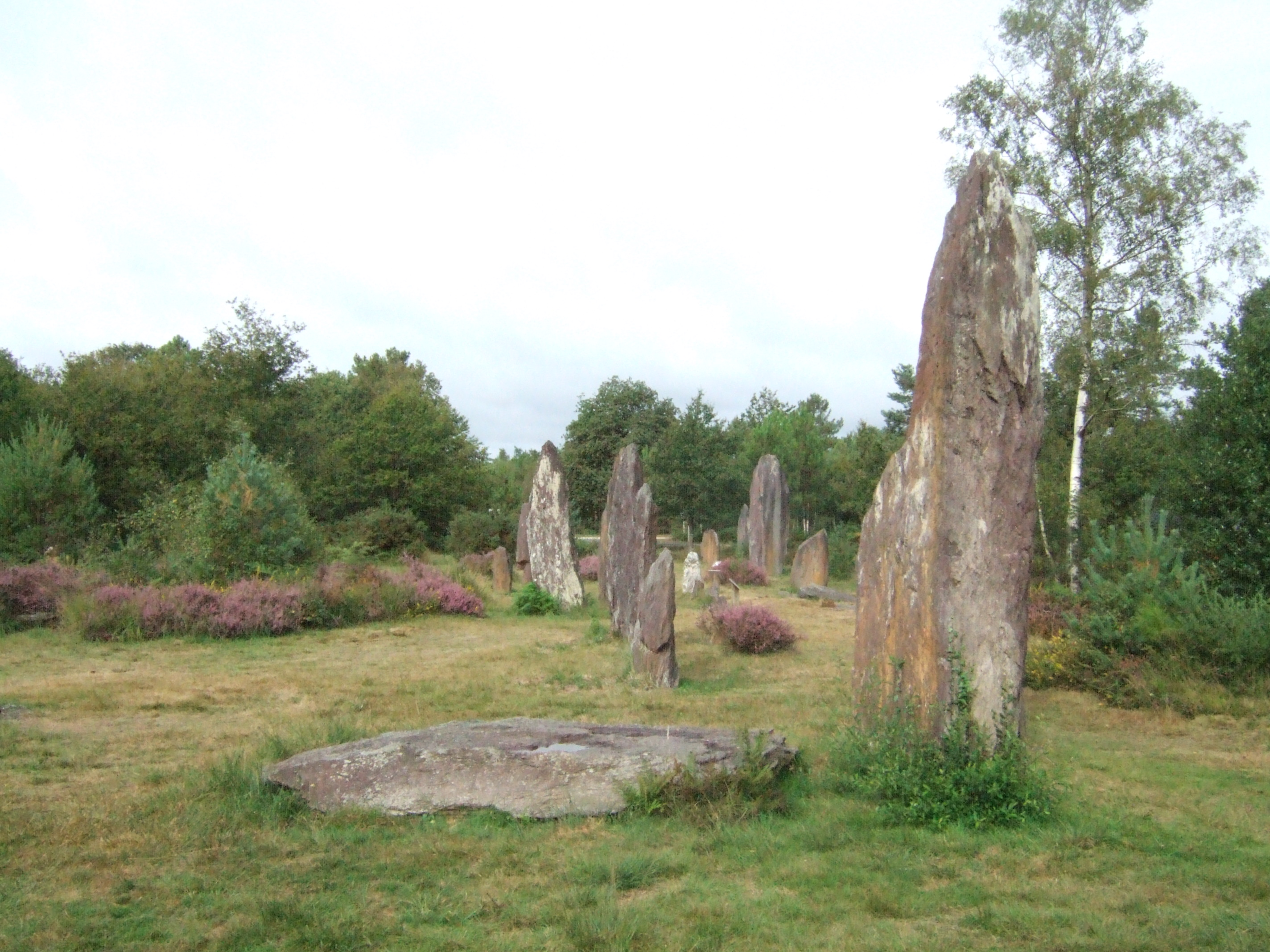 Alignements dans le domaine mégalithique des Pierres droites à Monteneuf (Morbihan).